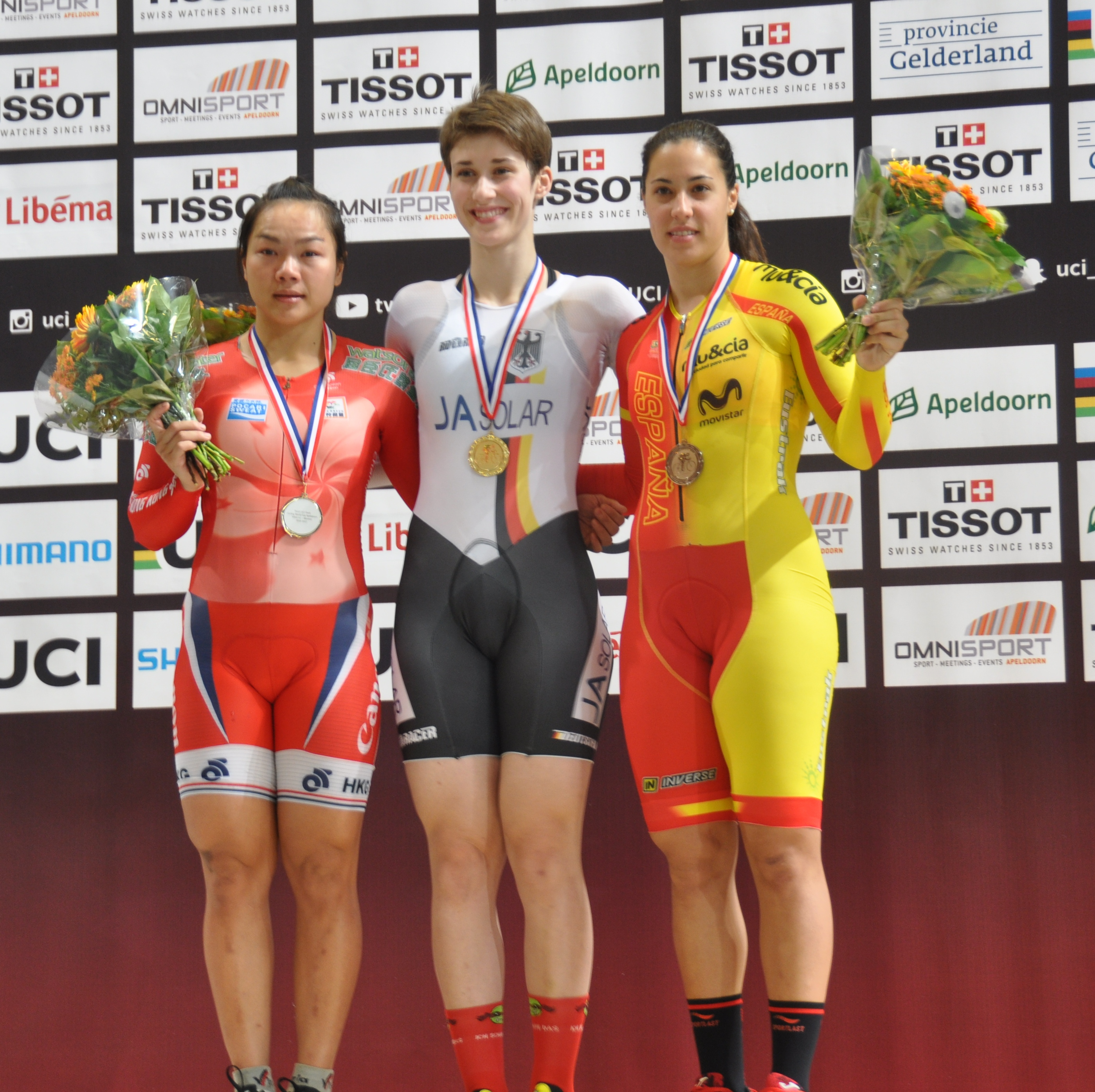 Podium im Zeitfahren der Frauen, v.l.n.r.: Lee Wai Sze, Pauline Grabosch, Tania Calvo